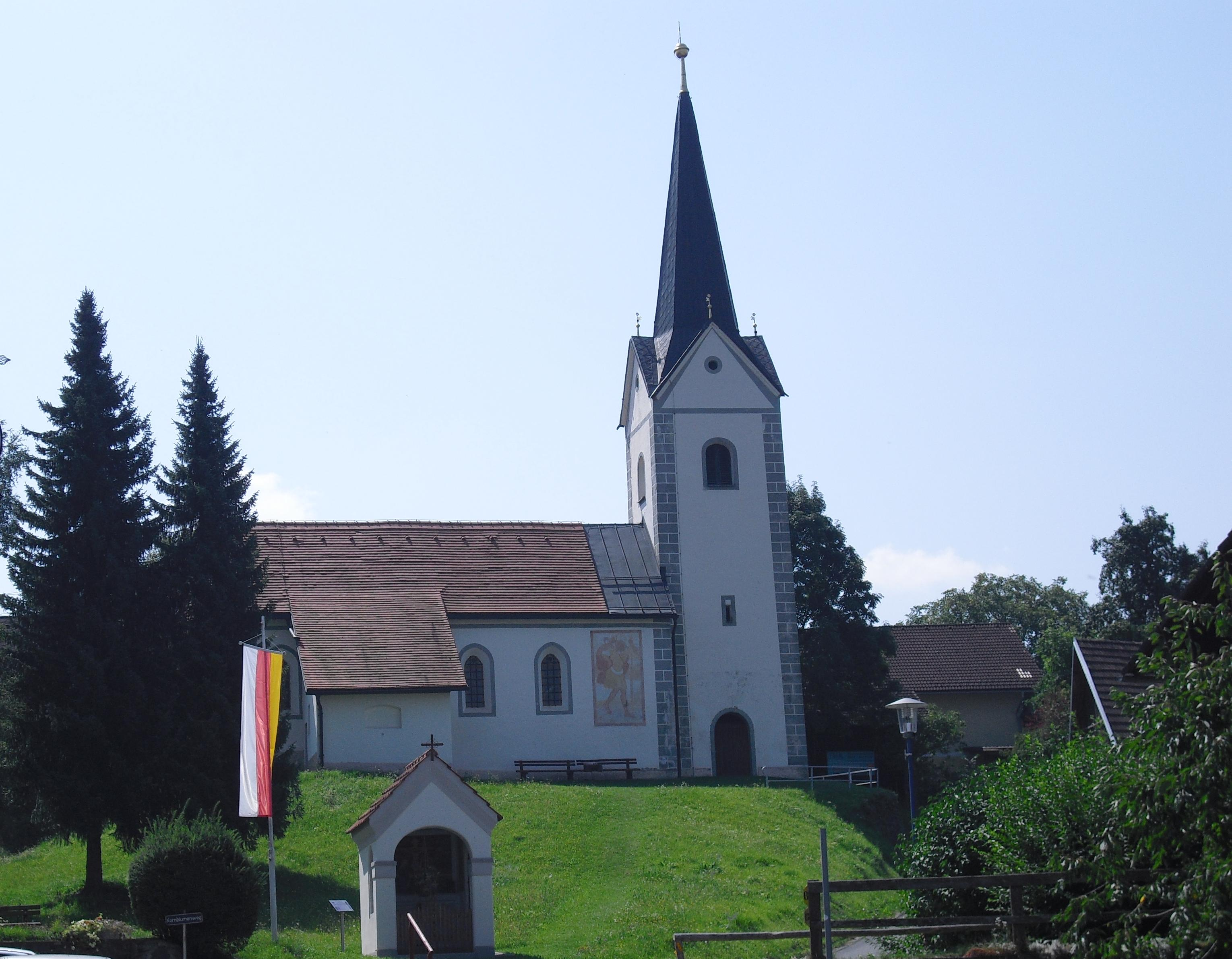 Filialkirche hl. Antonius und Lambert in Gösselsdorf, Österreich